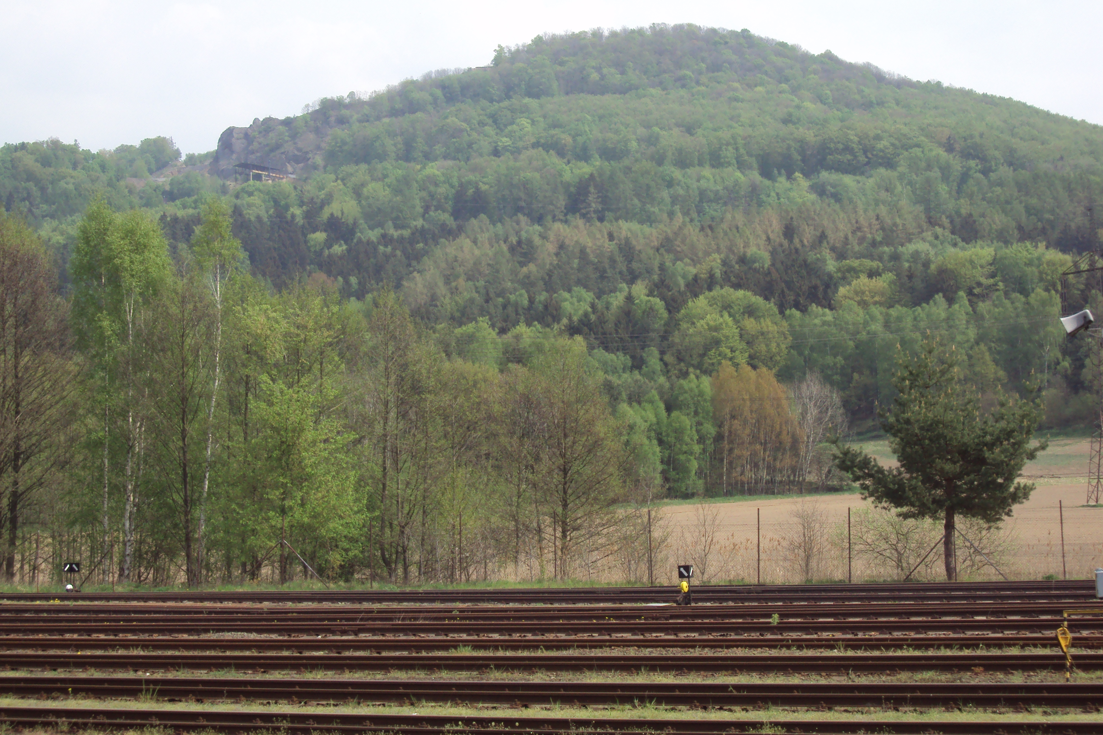 Kopec od nádraží Brniště